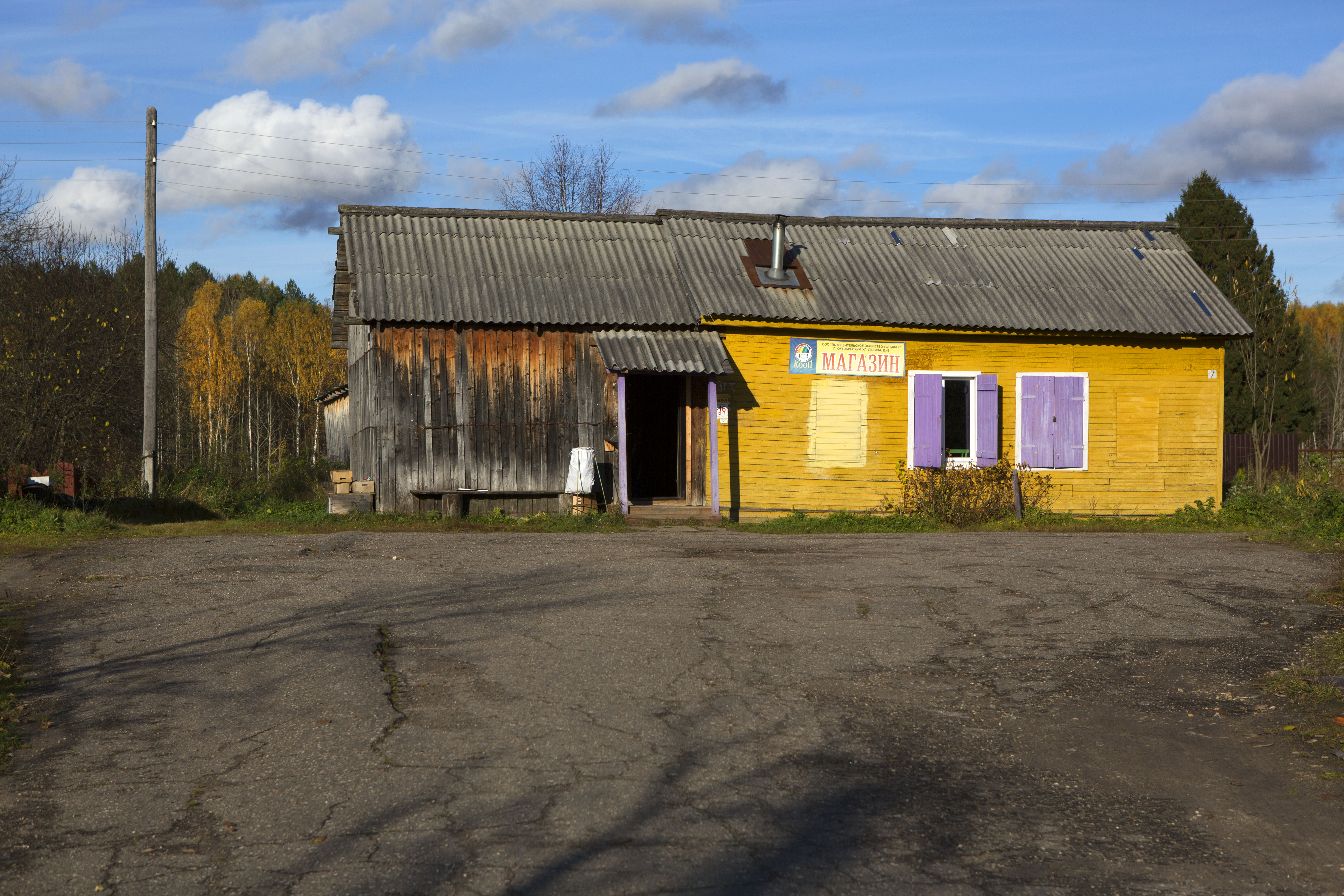 Россия, Архангельская область